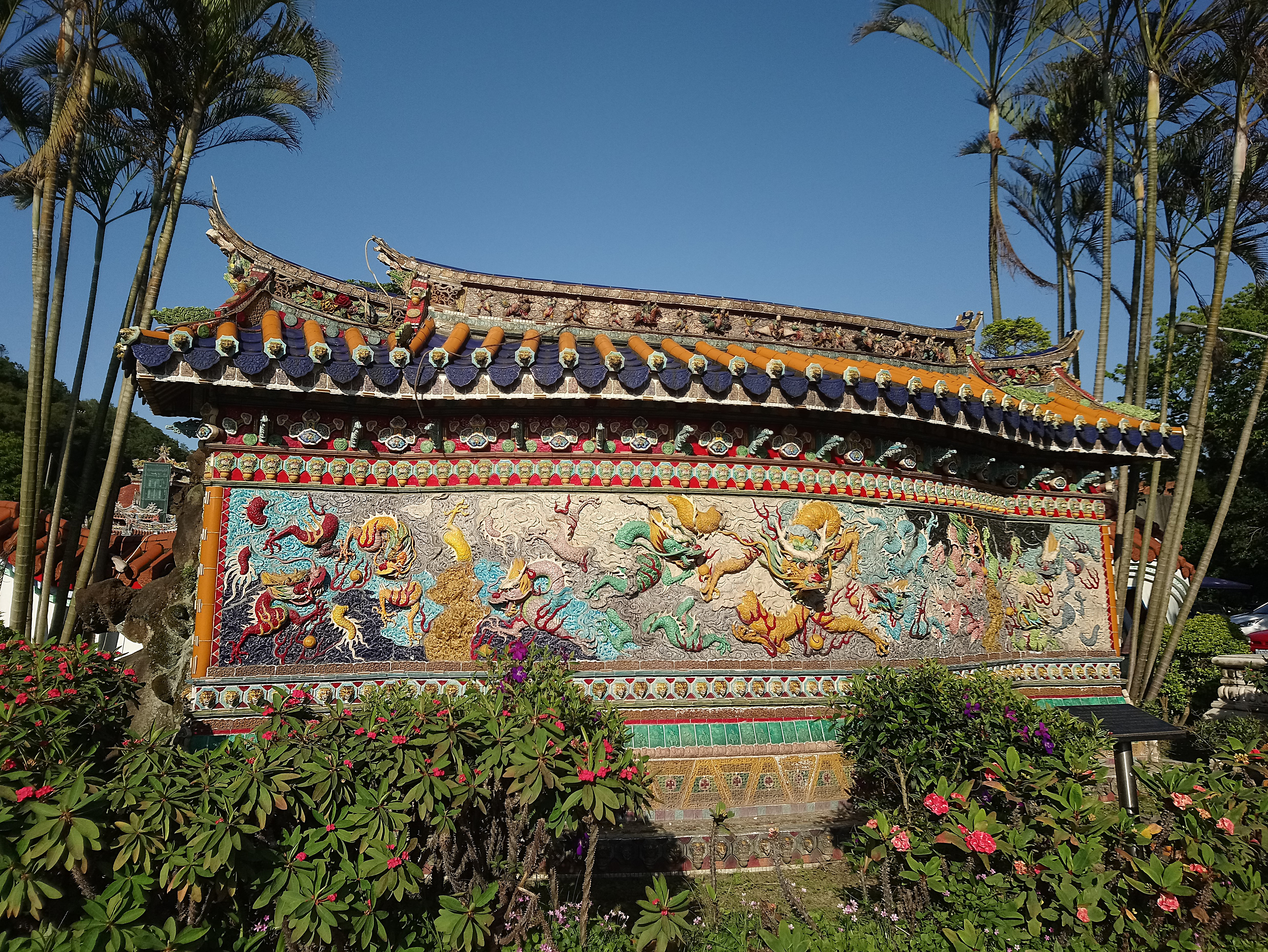 壽山巖觀音寺寶石陶九龍壁,桃園市龜山區嶺頂里